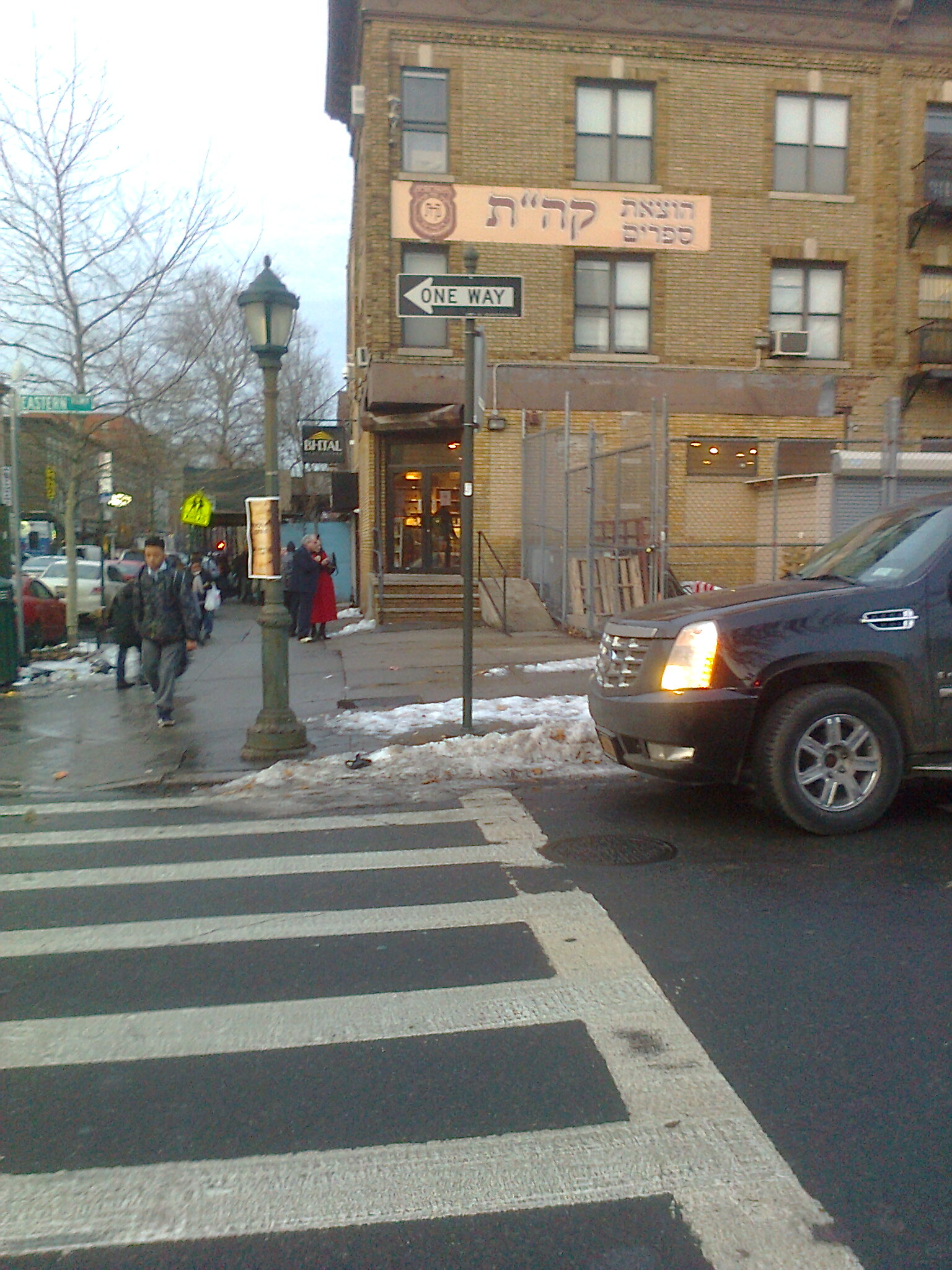 חנות קה"ת בניו יורק, פינת איסטרן פרקוויי-קינגסטון